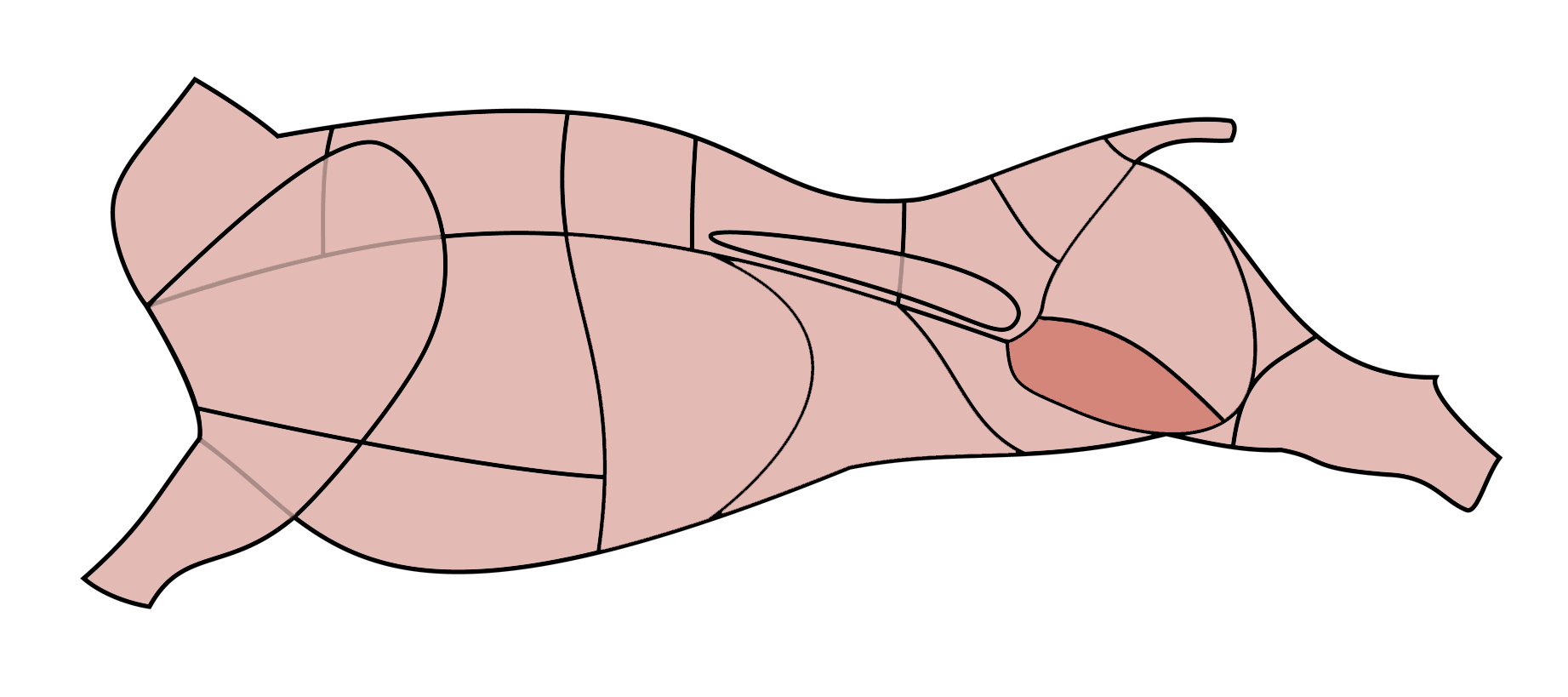 Unterschale vom Rind.